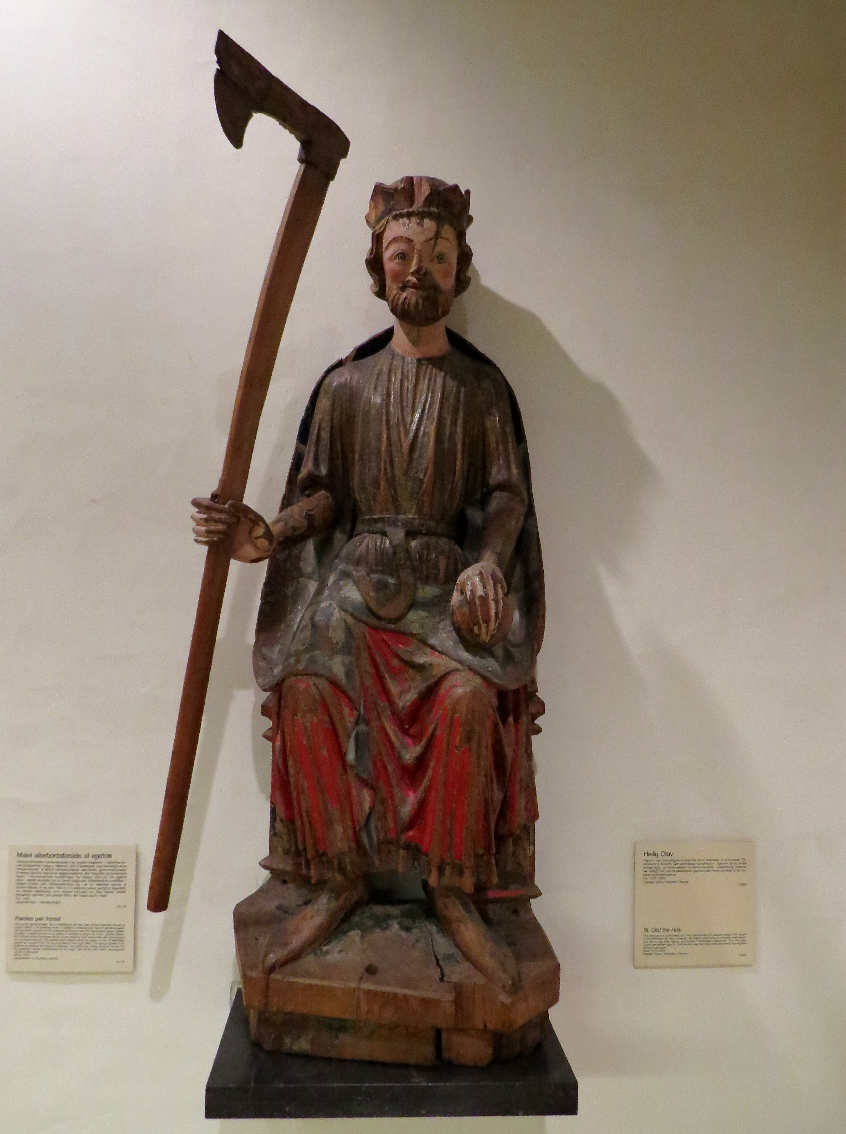 Fyrretræsskulptur af Hellig Olav, ca. 1275-1300, fra Tylldalen Kirke, Hedmark, nu i Nationalmuseet i København